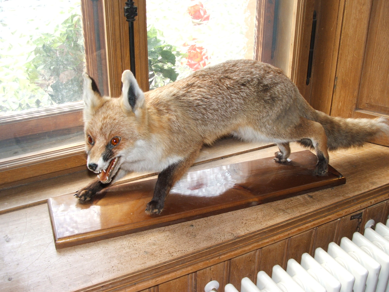 Immagine da Gressoney-Saint-Jean, Val d'Aosta - Museo Regionale della Fauna Alpina - Alpenfaunamuseum "Beck-Peccoz"